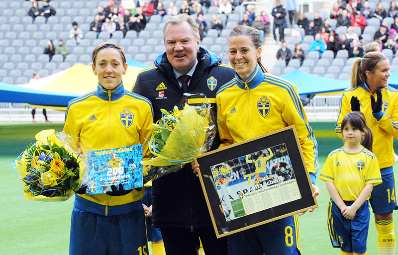 Therese Sjögran, Karl-Erik Nilsson och Lotta Schelin